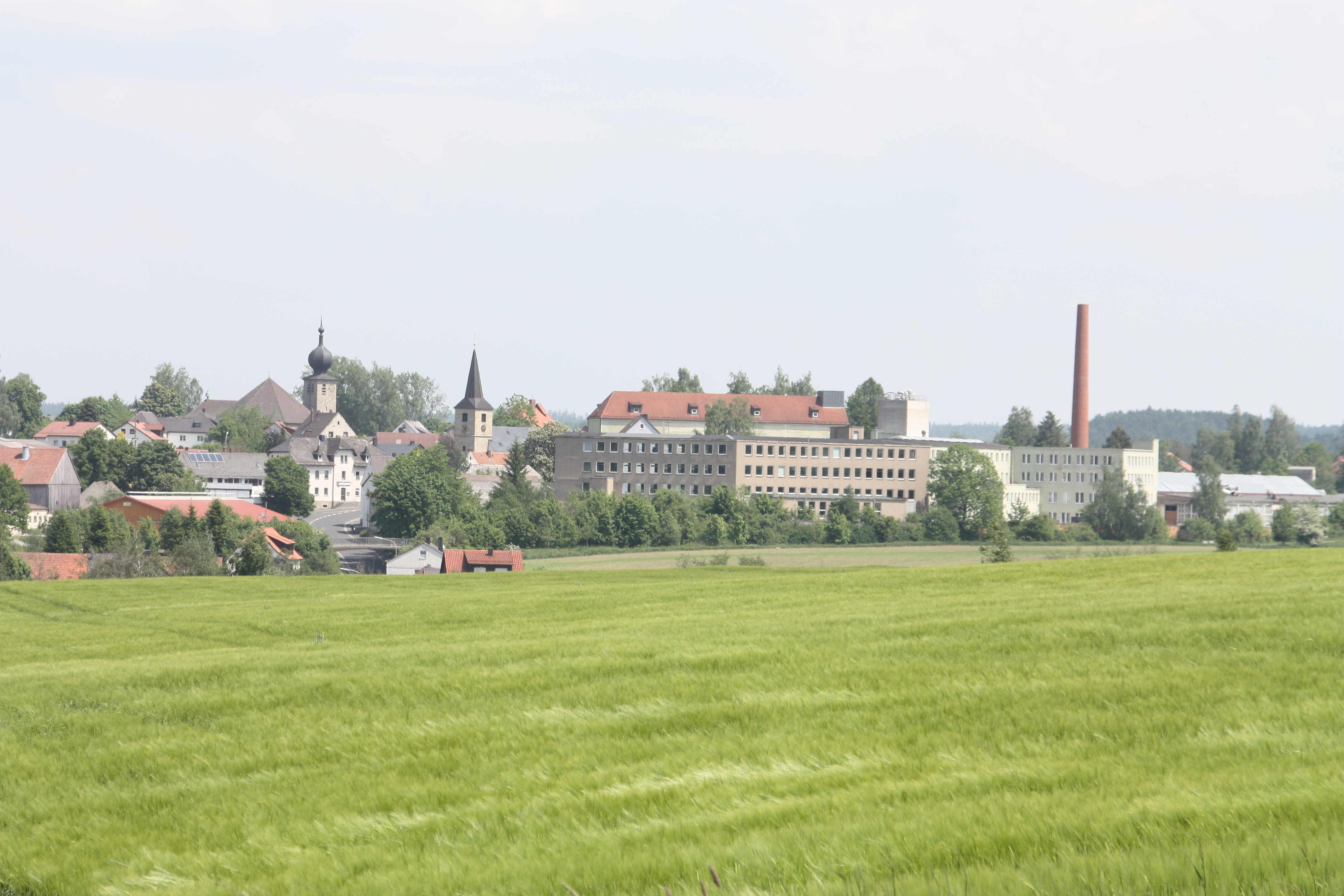 Krummennaab von Nordwesten